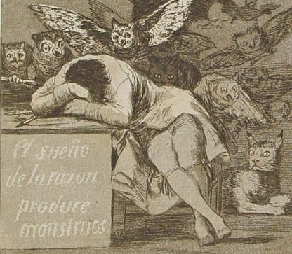 Detalle 1